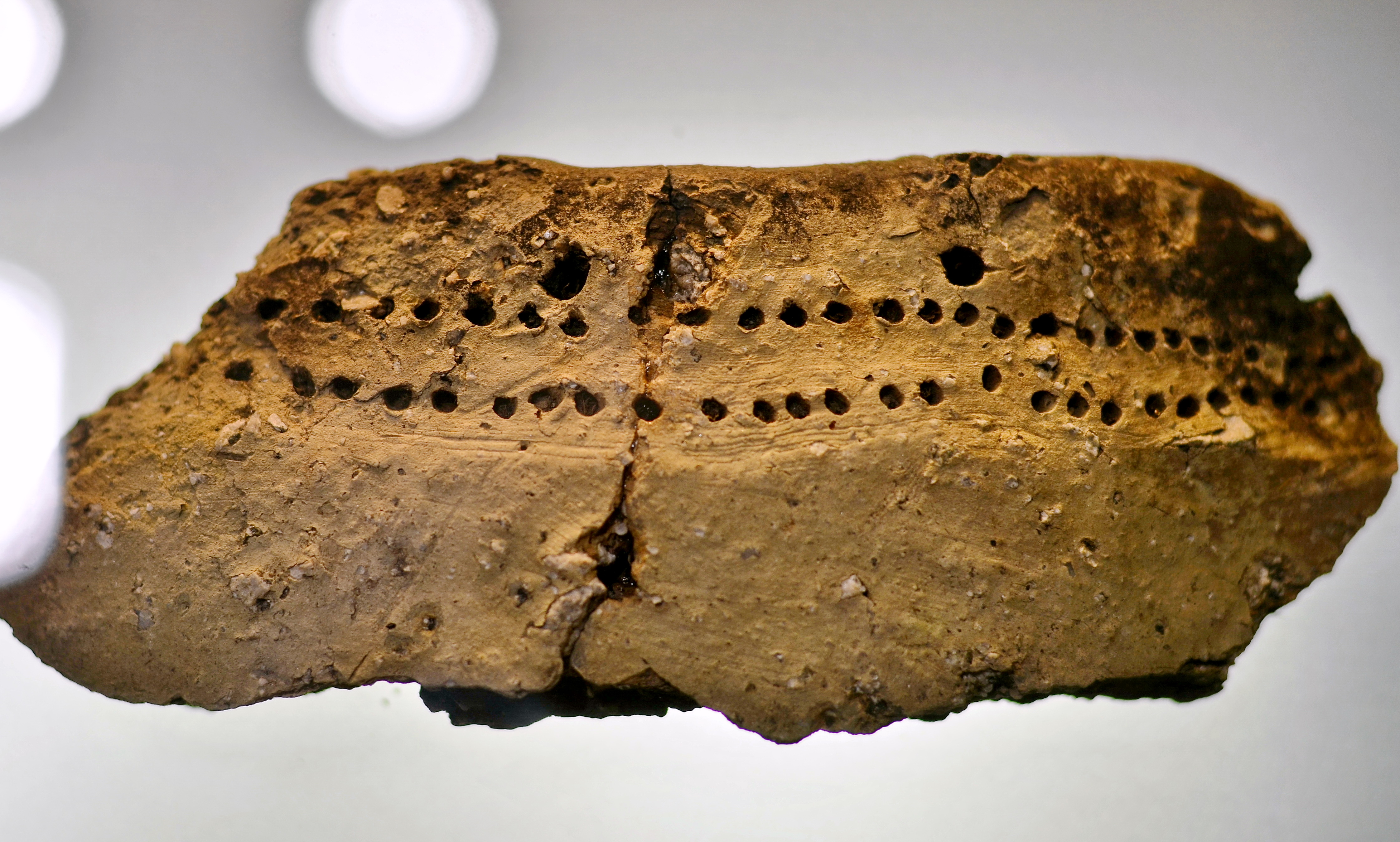 Archäologie im Parkhaus Opèra, Sechseläutenplatz in Zürich (Switzerland)